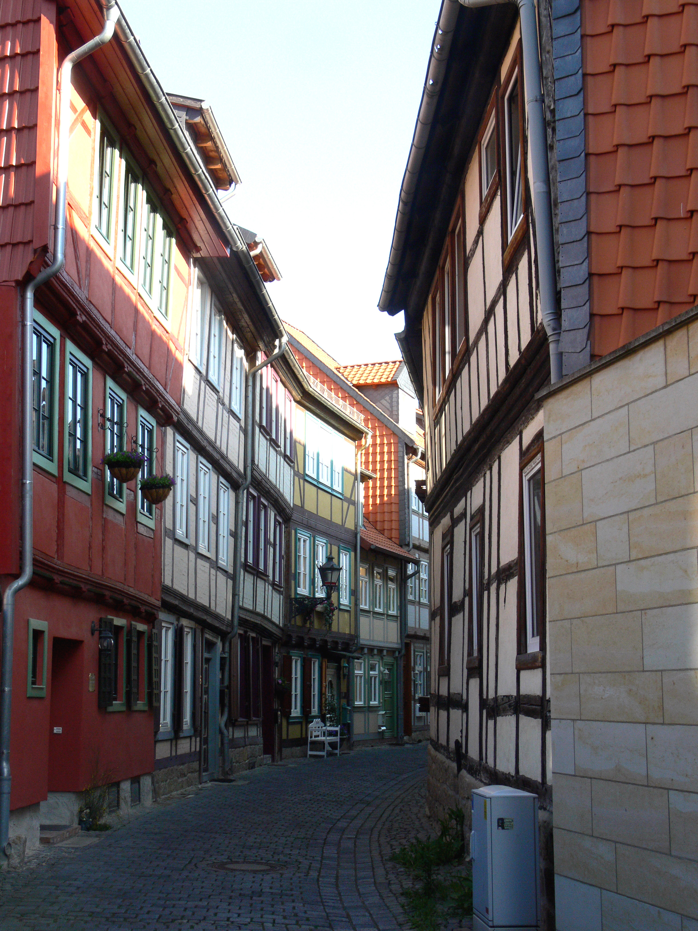 Rosenwinkel in Halberstadt.